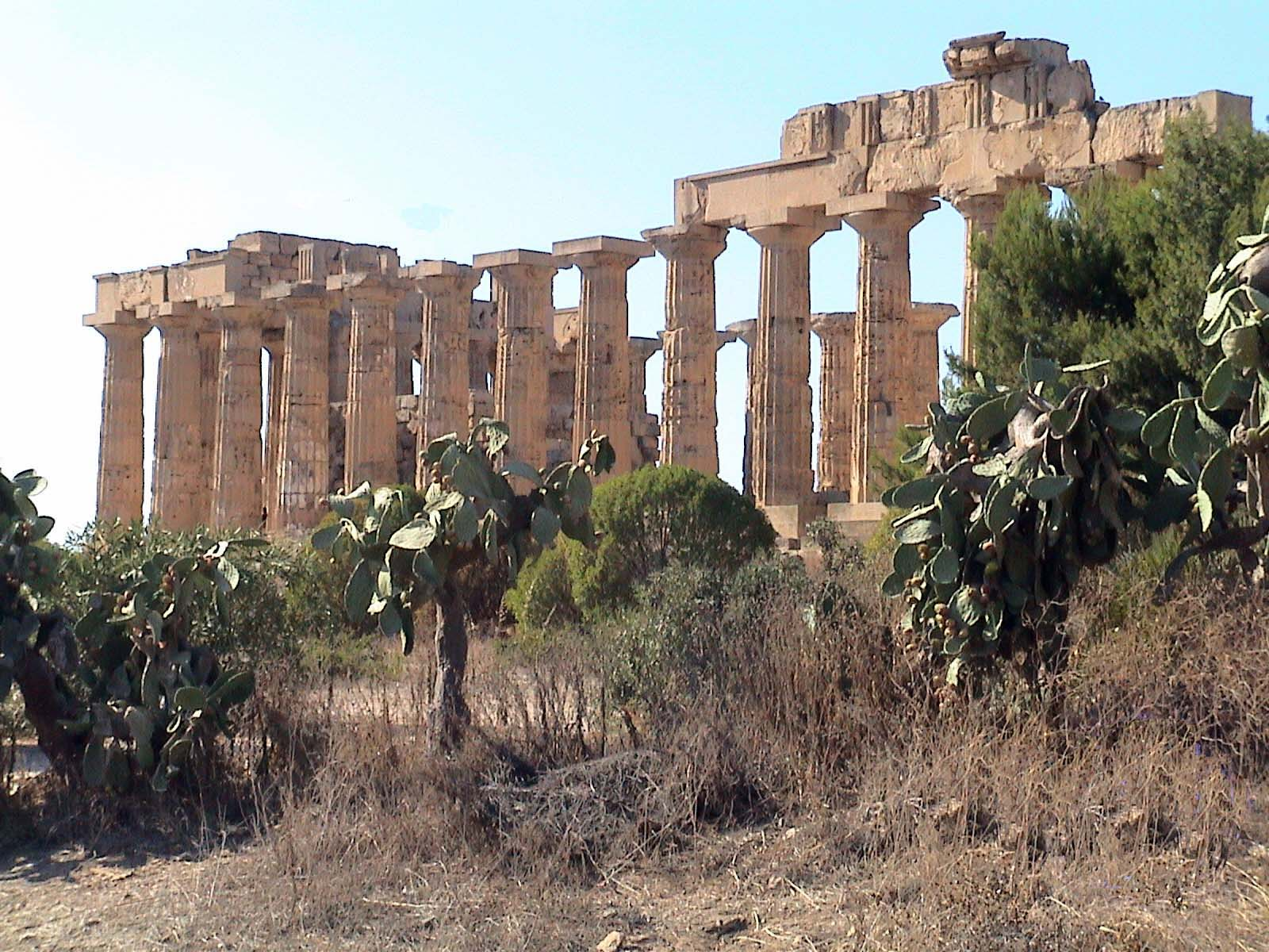 Selinunte - Temple E